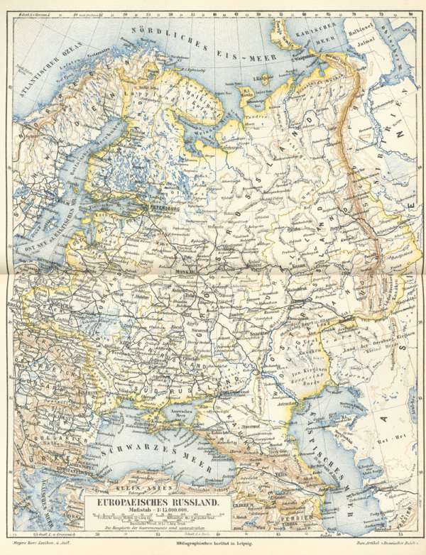 Europäisches Russland (Doppelseitige Farbkarte)